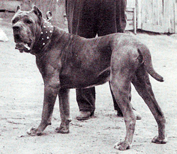 Siento, in una foto degli anni 50, uno dei due stalloni utilizzati da Piero Scanziani per recuperare la razza del mastino napoletano